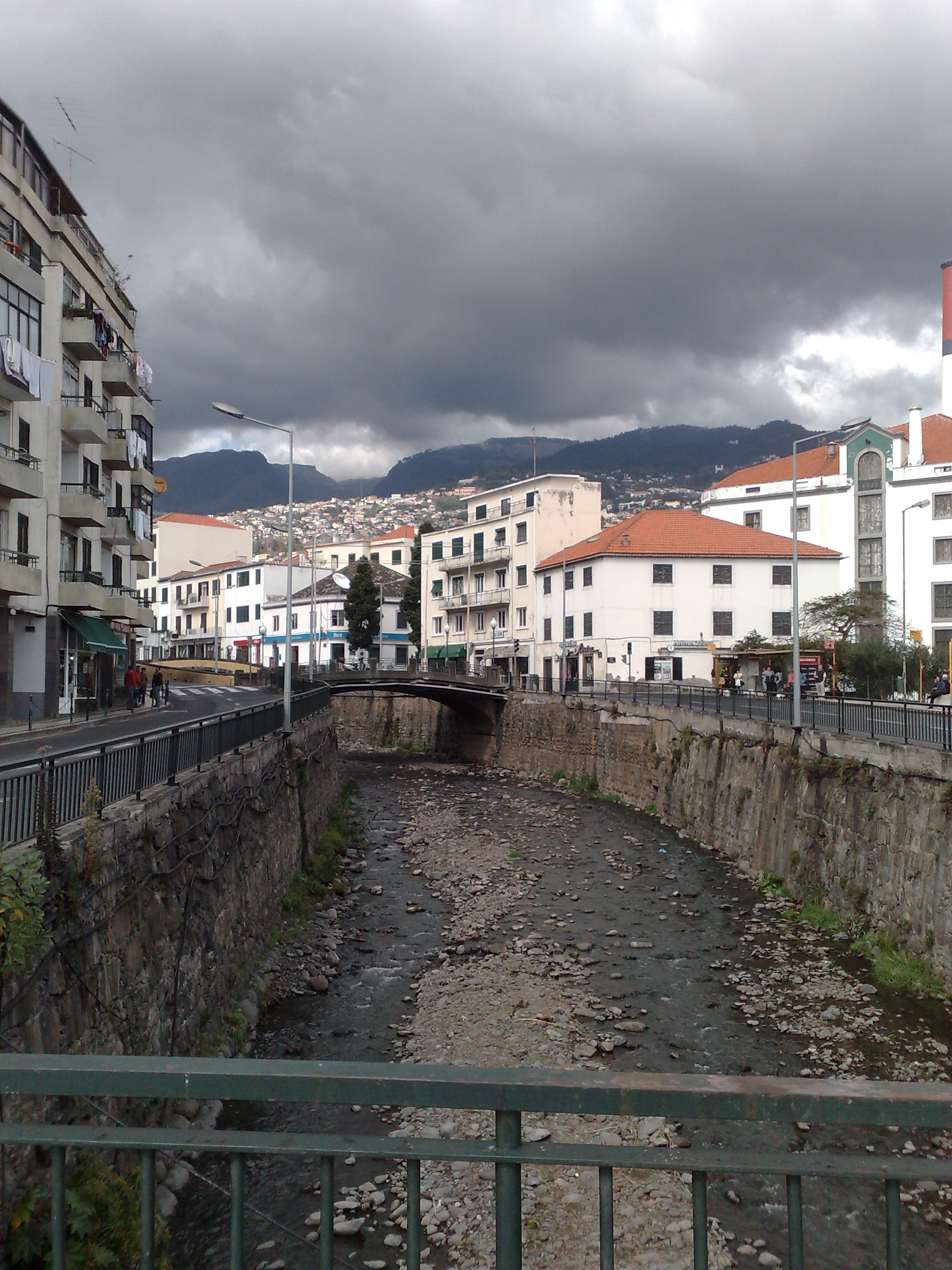 Ribeira de Santa Luzia, Funchal